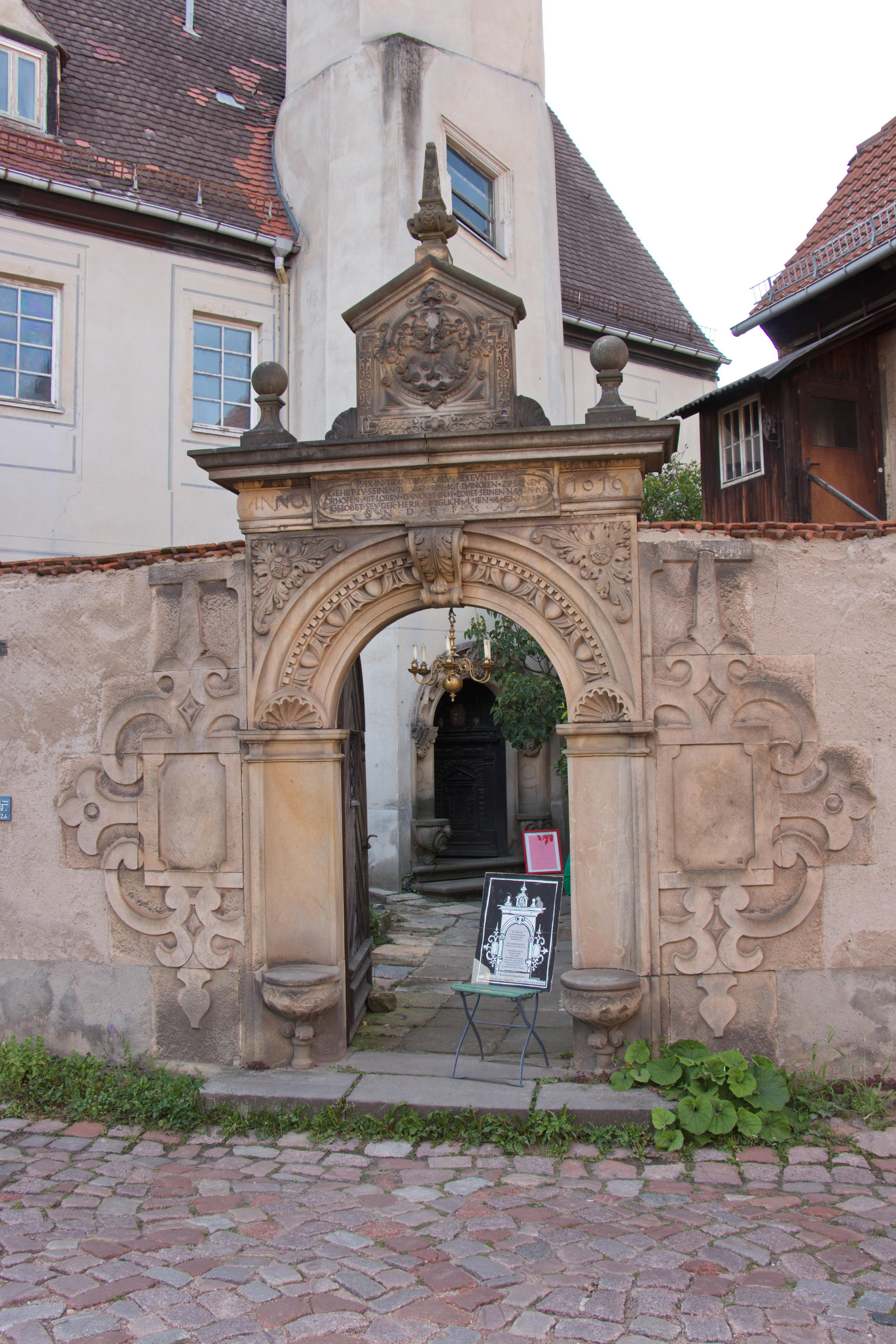 Meißen, Freiheit 6, Jahnscher Hof, Portal